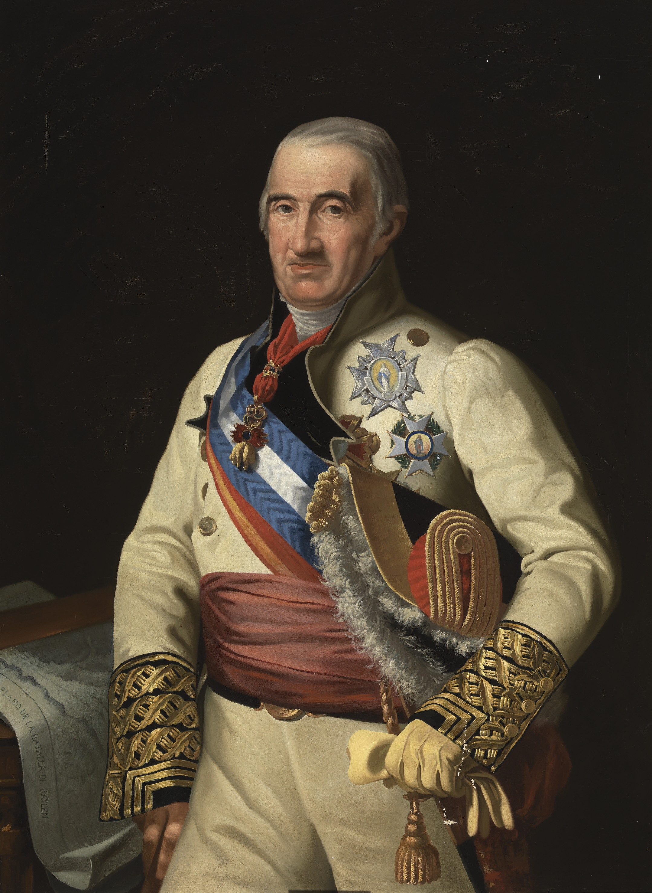 Retrato del general Francisco Javier Castaños (1758-1852), que derrotó a los franceses en la batalla de Bailén, librada en 1808. El lienzo fue comprador en el año 1880 por la Junta Iconográfica Nacional a fin de que entrara a formar parte de la Galería de Españoles Ilustres del Museo Iconográfico.